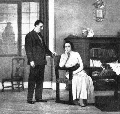 Juan Bonafé y Mercedes Pérez de Vargas en una escena de la obra de teatro La propia estimación, de Jacinto Benavente